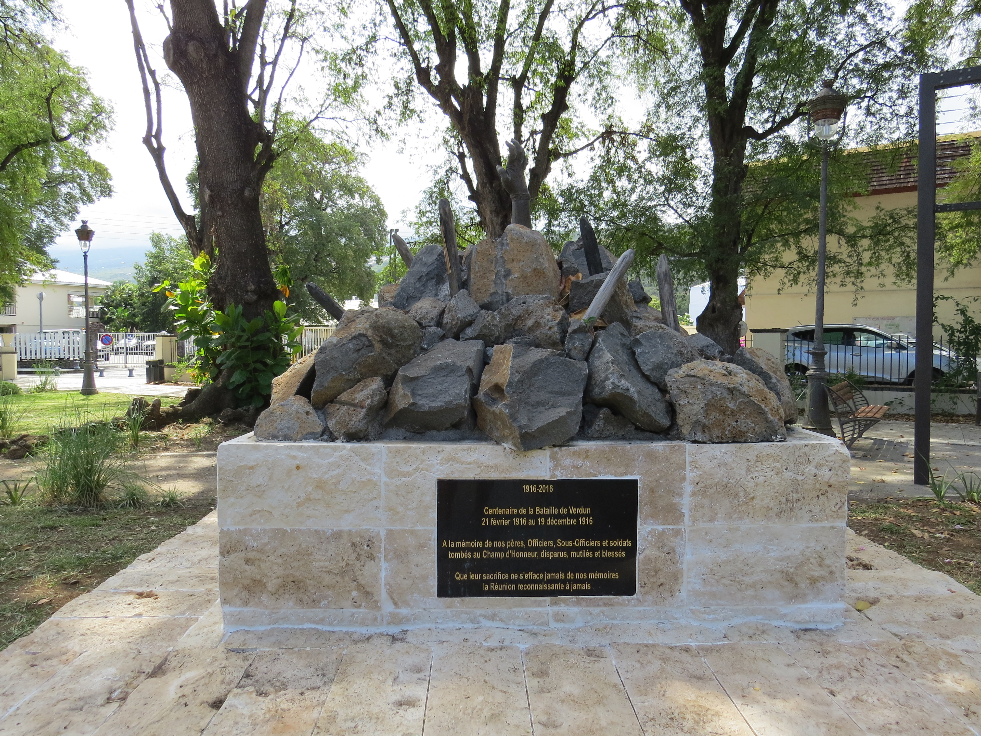 Stèle commémorative située à Saint-Paul dans le Jardin de la liberté